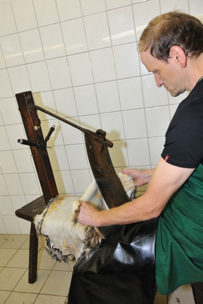 Pelzzurichtung, das Langziehen der Felle an der Kürschnerbank, in der Vorbereitung auf die Arbeiten am Rundmesser. Udo Meinelt & Söhne, Rötha